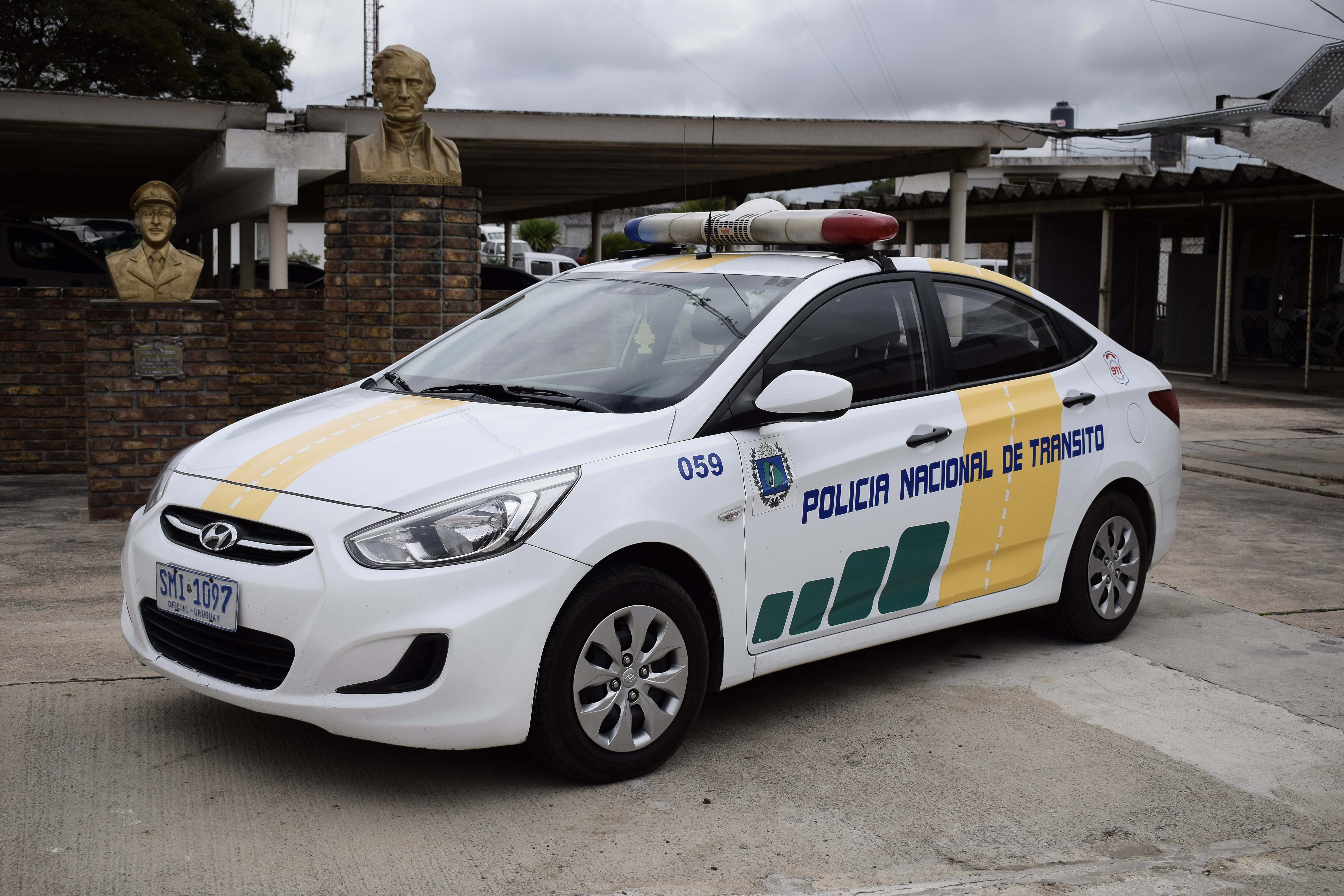 Patrullero Hyundai Accent